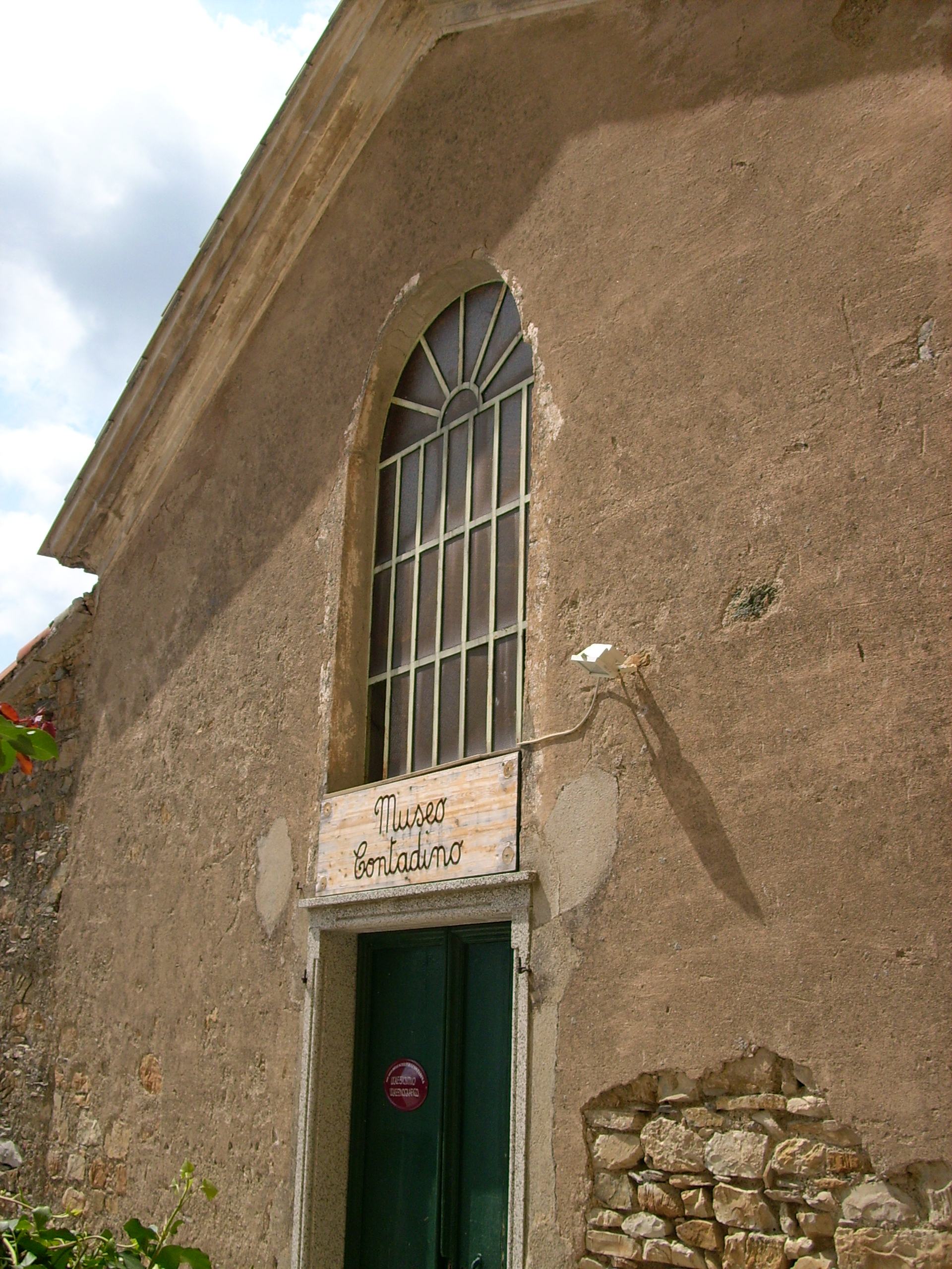 Museo Etnografico di Velva, Castiglione Chiavarese, Liguria, Italia